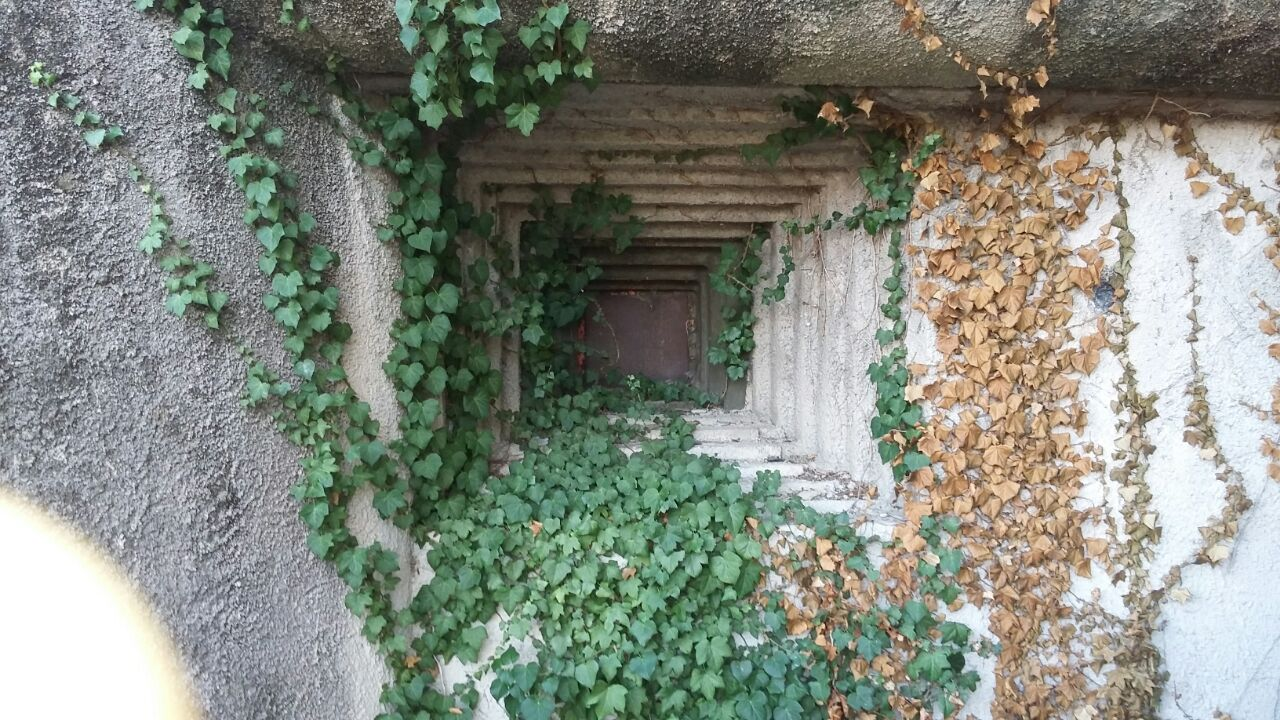 un des créneaux FM de l'ouvrage du Col-de-Garde, sur le bloc 4.